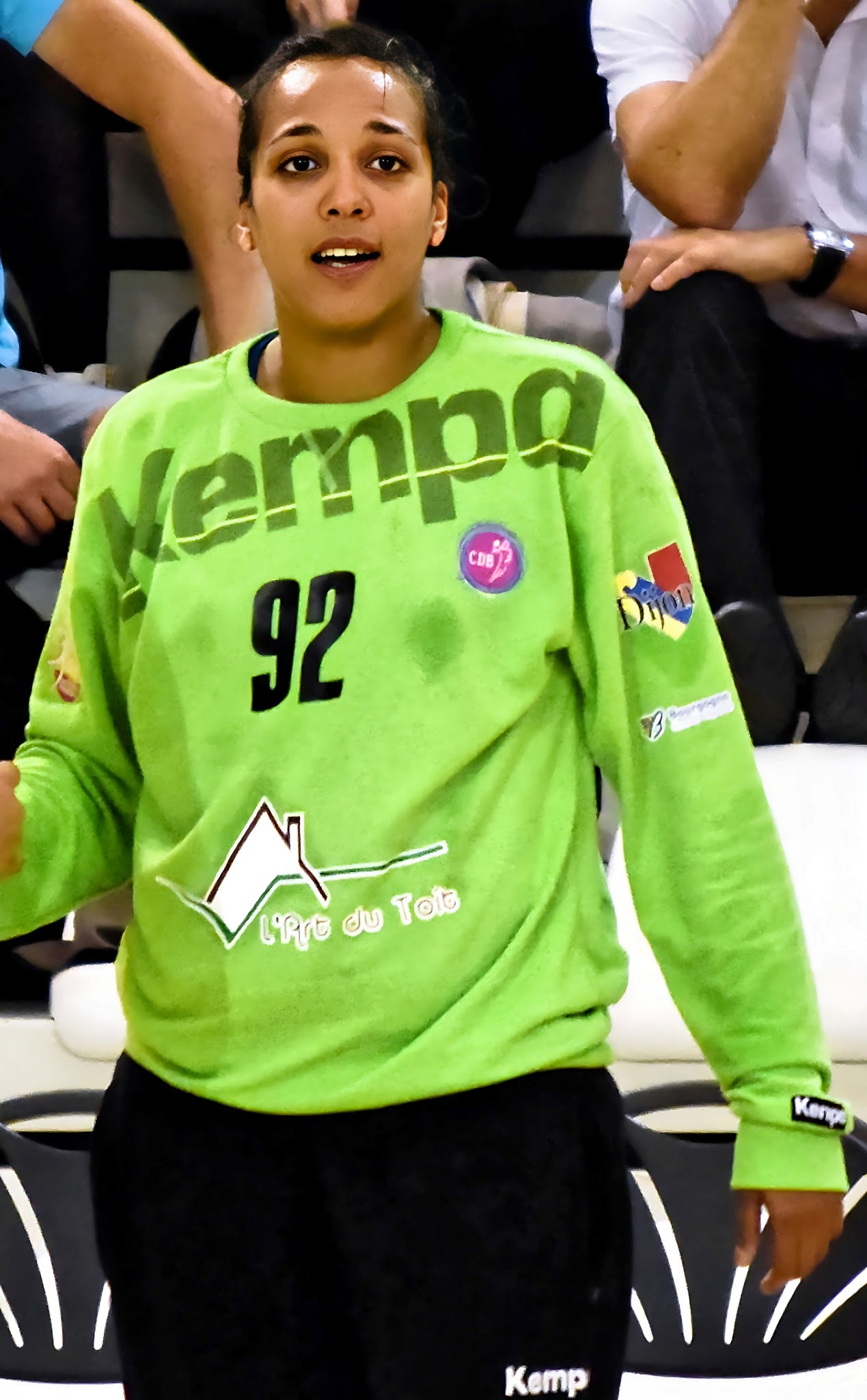 Rencontre de championnat entre Issy Paris Hand et Dijon. A Issy Les Moulineaux, le 19 octobre 2014.